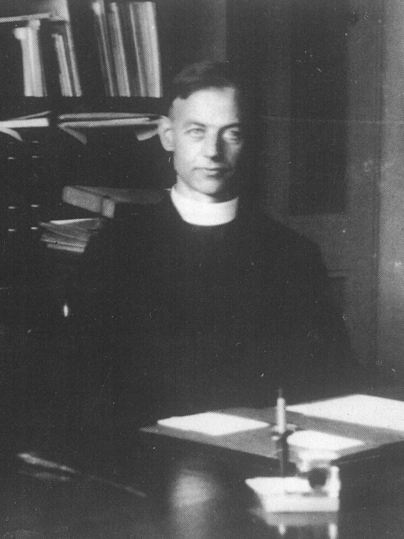 ヘルマン・ホイヴェルス